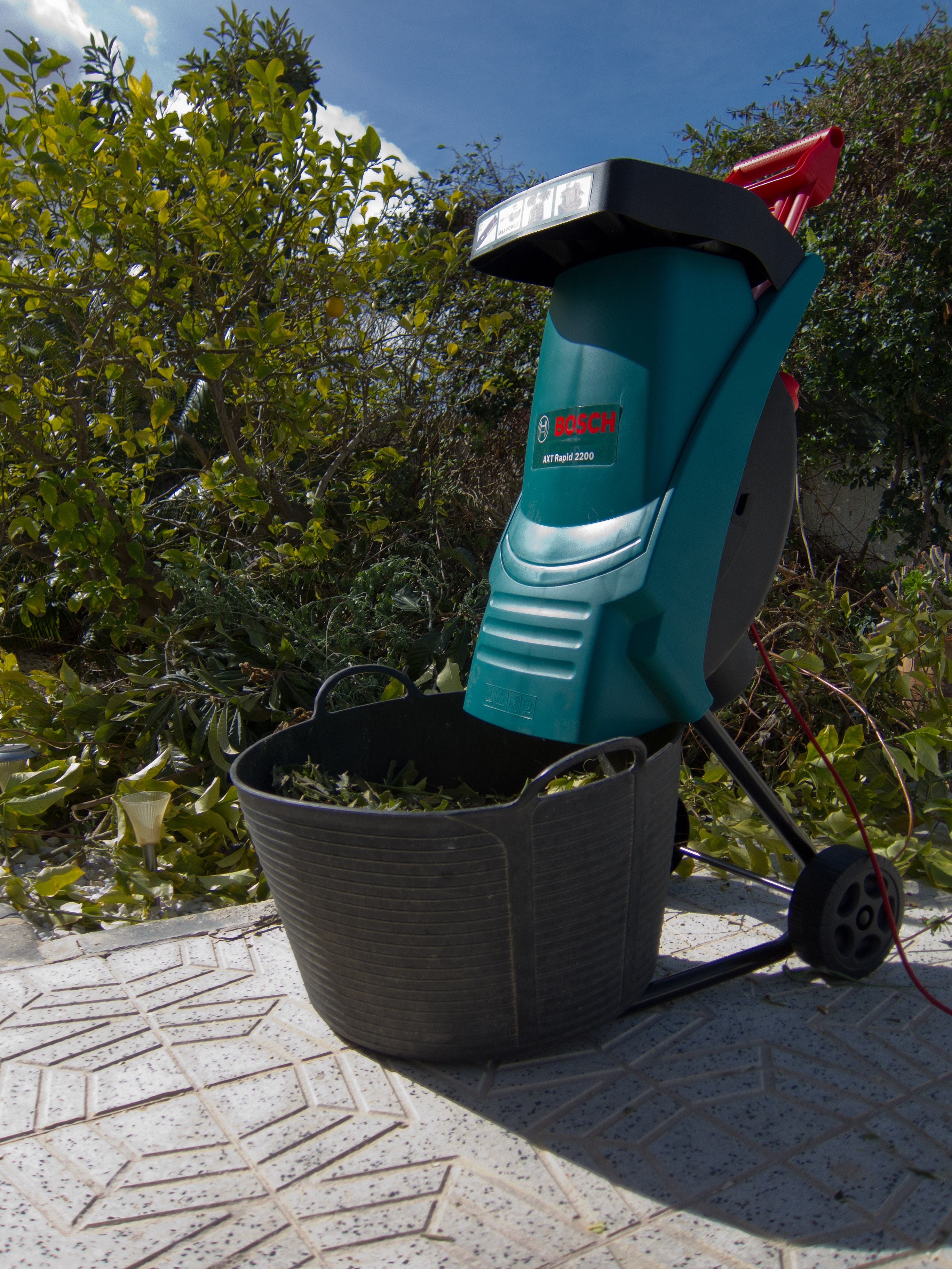 Elektro-Messerhäcksler Bosch AXT Rapid 2200